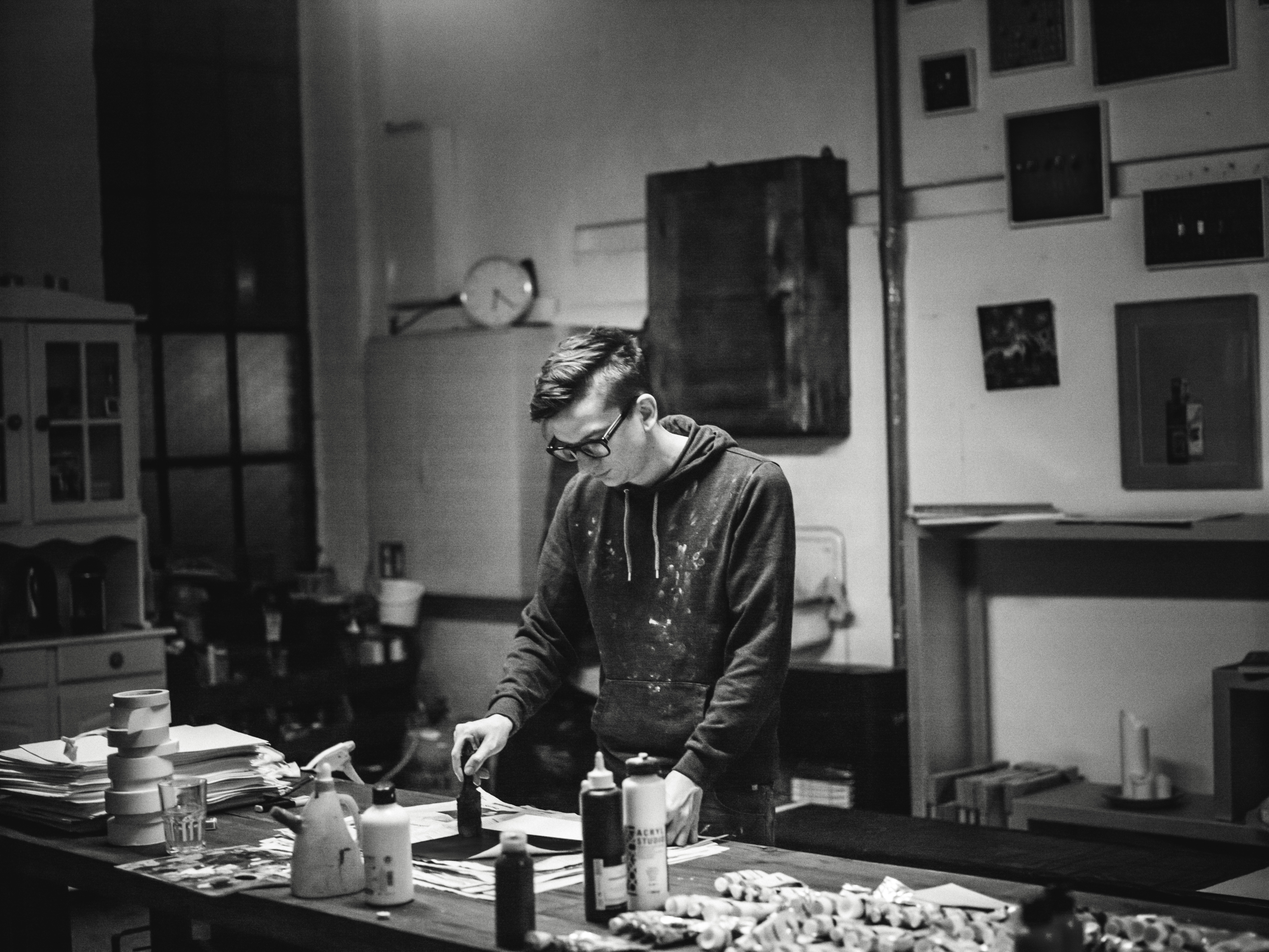 Danny Frede während seiner 24-stündigen Performance "256 Farbverläufe" im Dezember 2017.